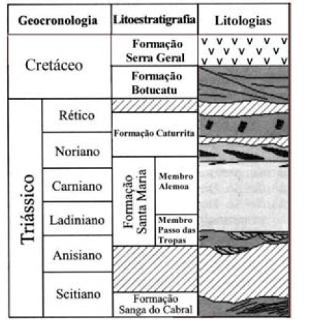 Formações do Rio Grande do Sul